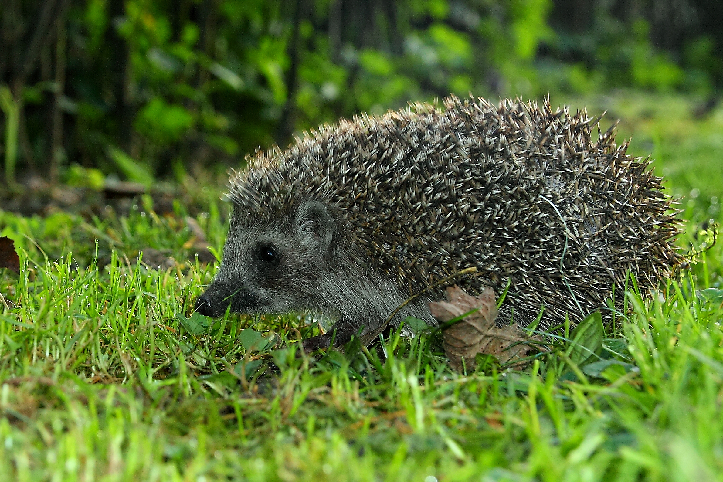 Beloprsi jež